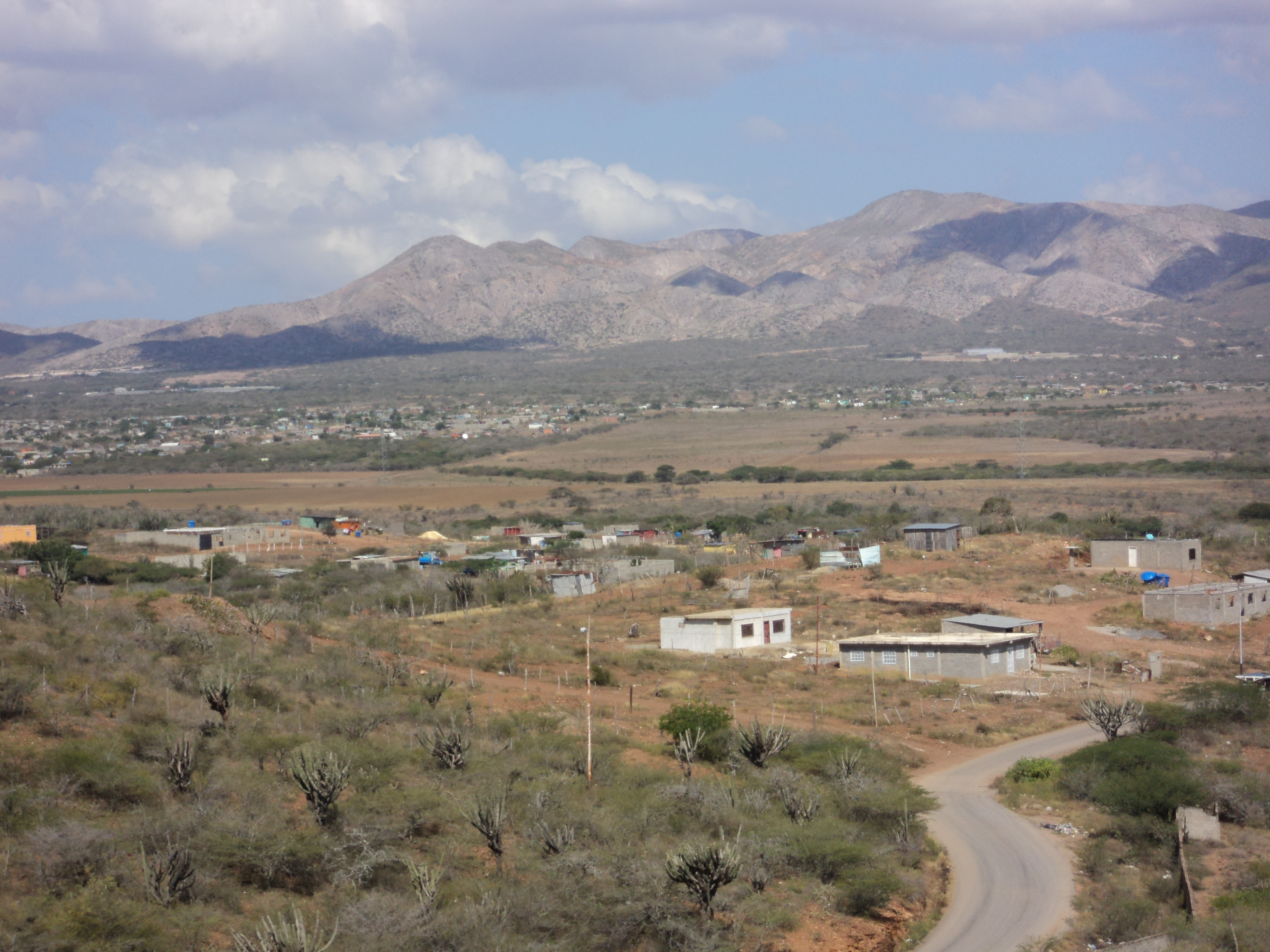 Llanura desrtica a la salida de barquisimeto hacia Trujillo, Esto es lo mas poblado. el resto es desierto montañoso.